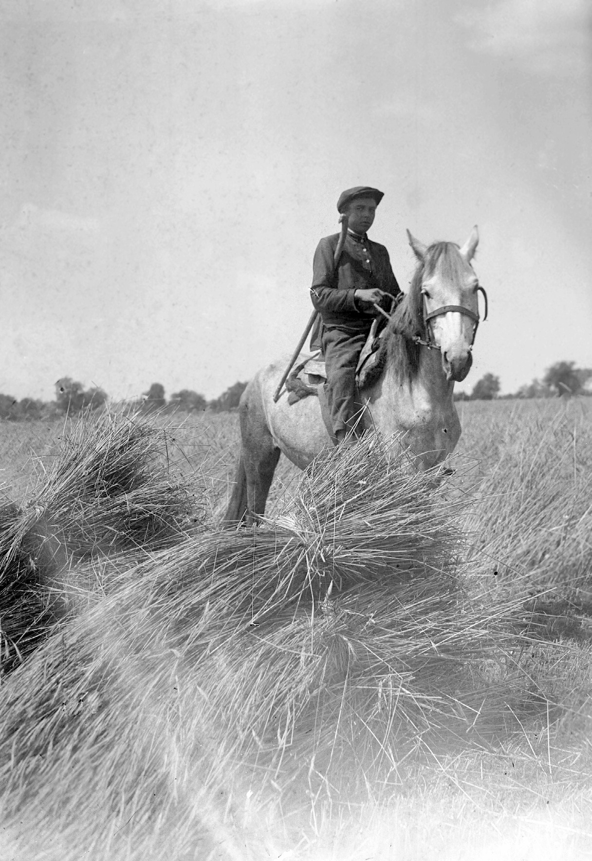 Охорона врожаю у колгоспі "Червона зірка" Полтавської області.